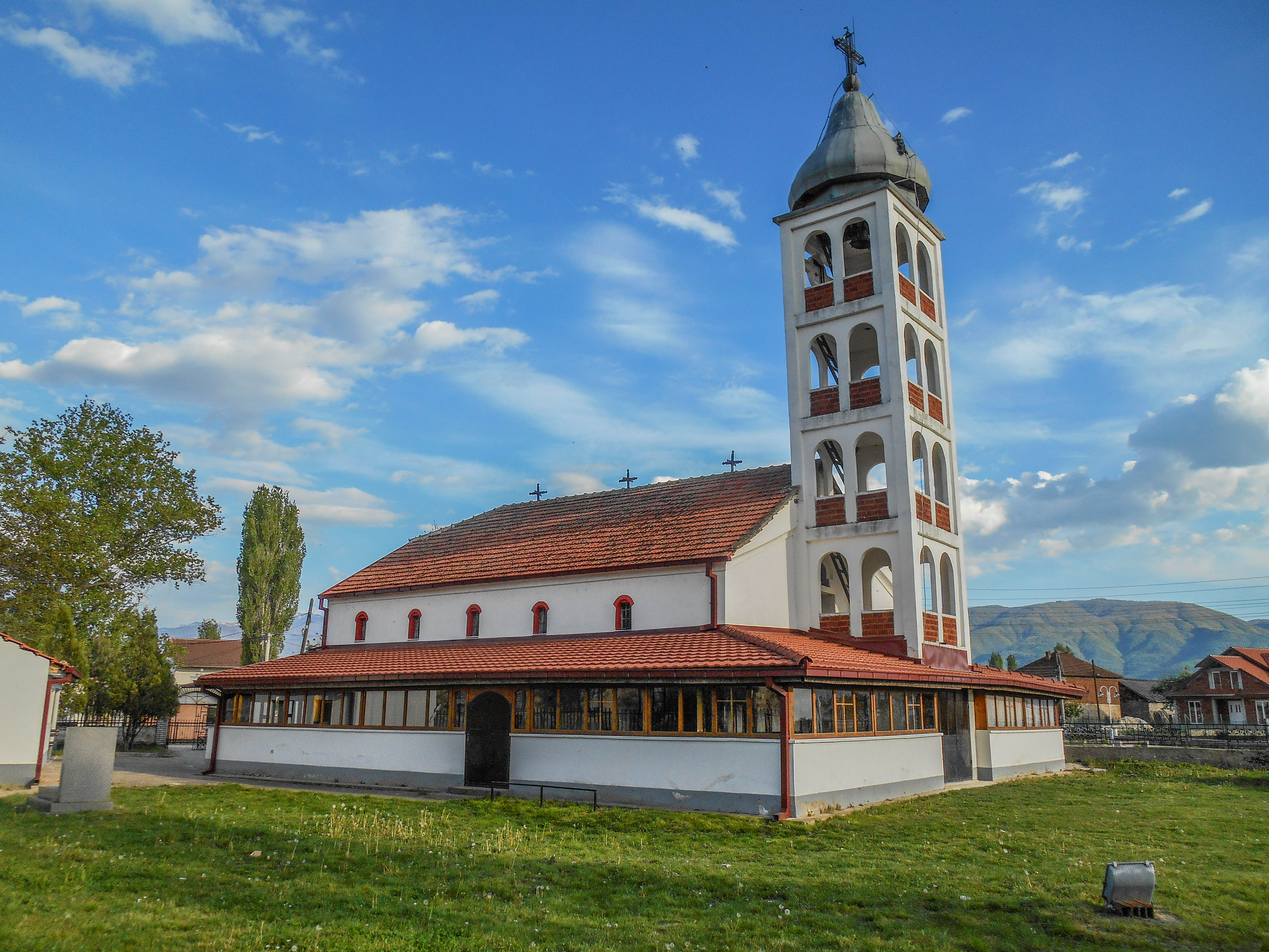 Црква „Св. Спас“ - Робово